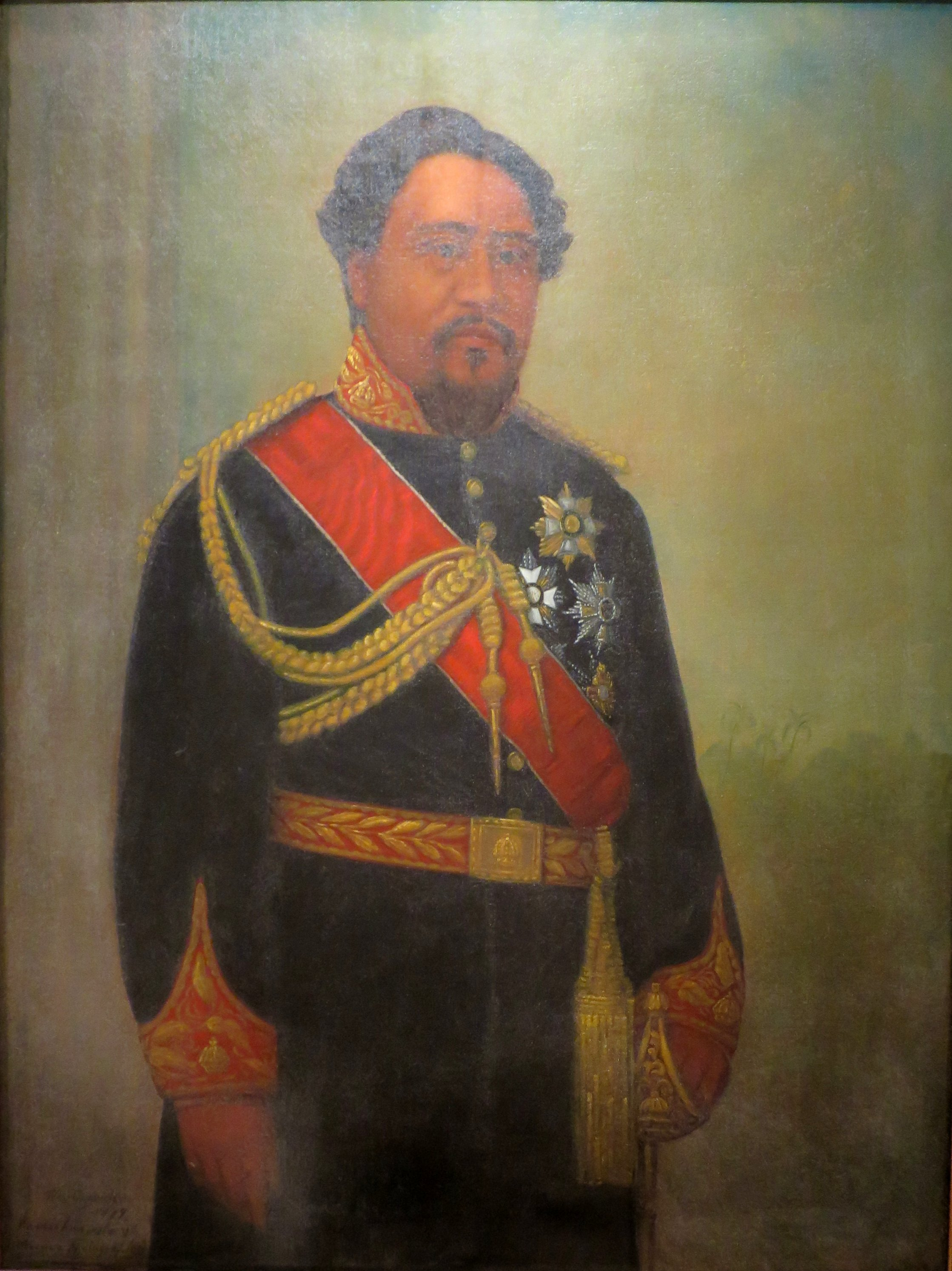 Kamehameha V, King of Hawaii 1863-1872